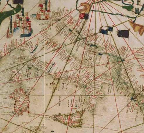 Carta catalana (Mappamondo catalano). Ms. membr., sec. 15., diametro mm 1130. 1452 ?